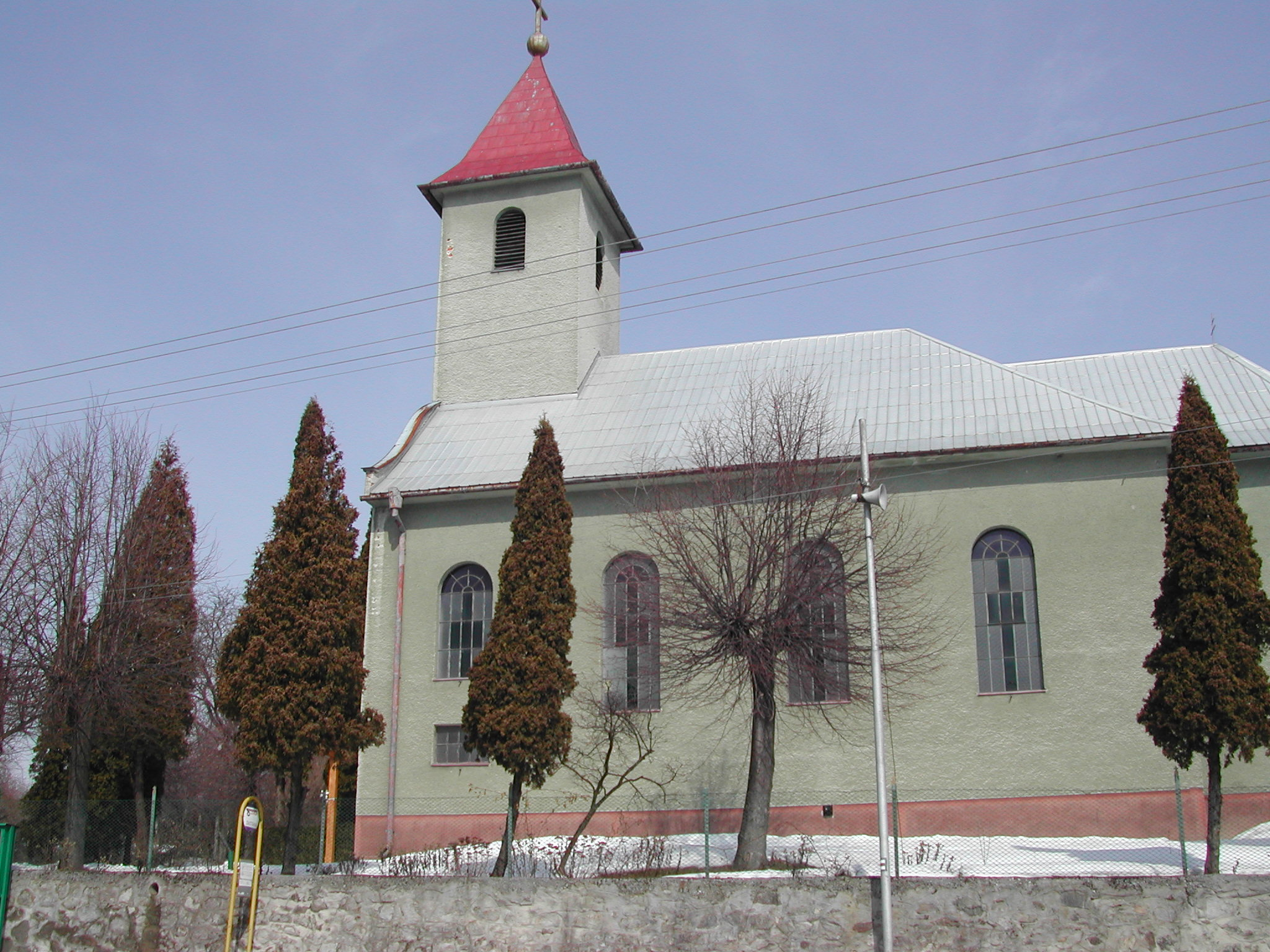 Rímskokatolícky kostol v Zlatne, okres Zlaté Moravce